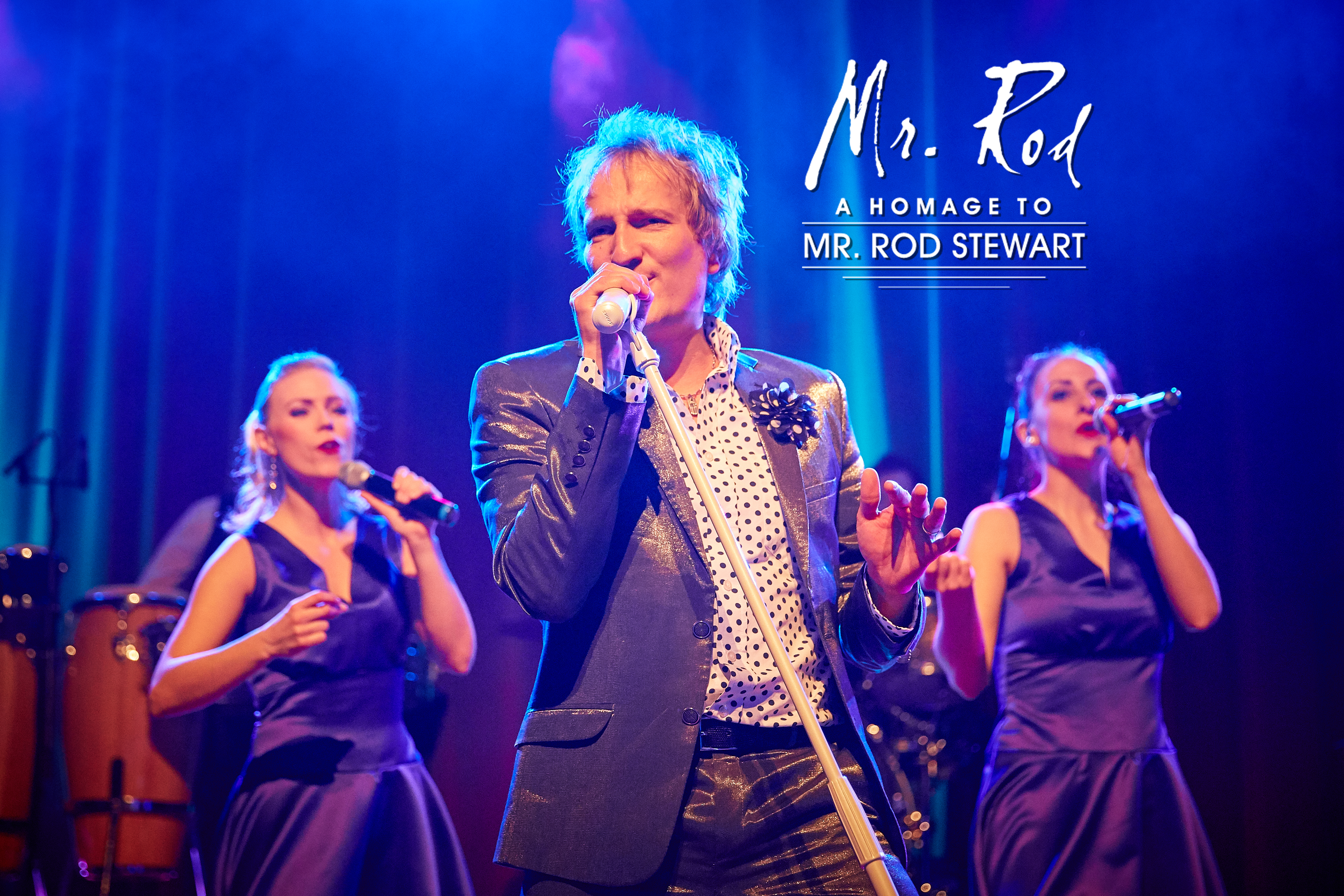 Mister Rod LIVE 2017 (Gewandhaus Leipzig)